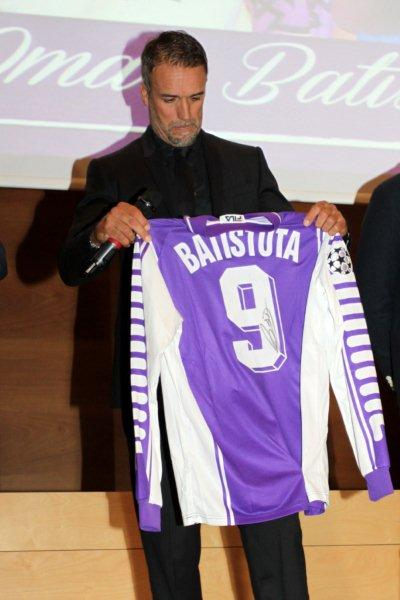 Gabriel Omar Batistuta (Avellaneda, 1º febbraio 1969) è un dirigente sportivo, allenatore di calcio ed ex calciatore argentino, di ruolo attaccante. (from it.wp)